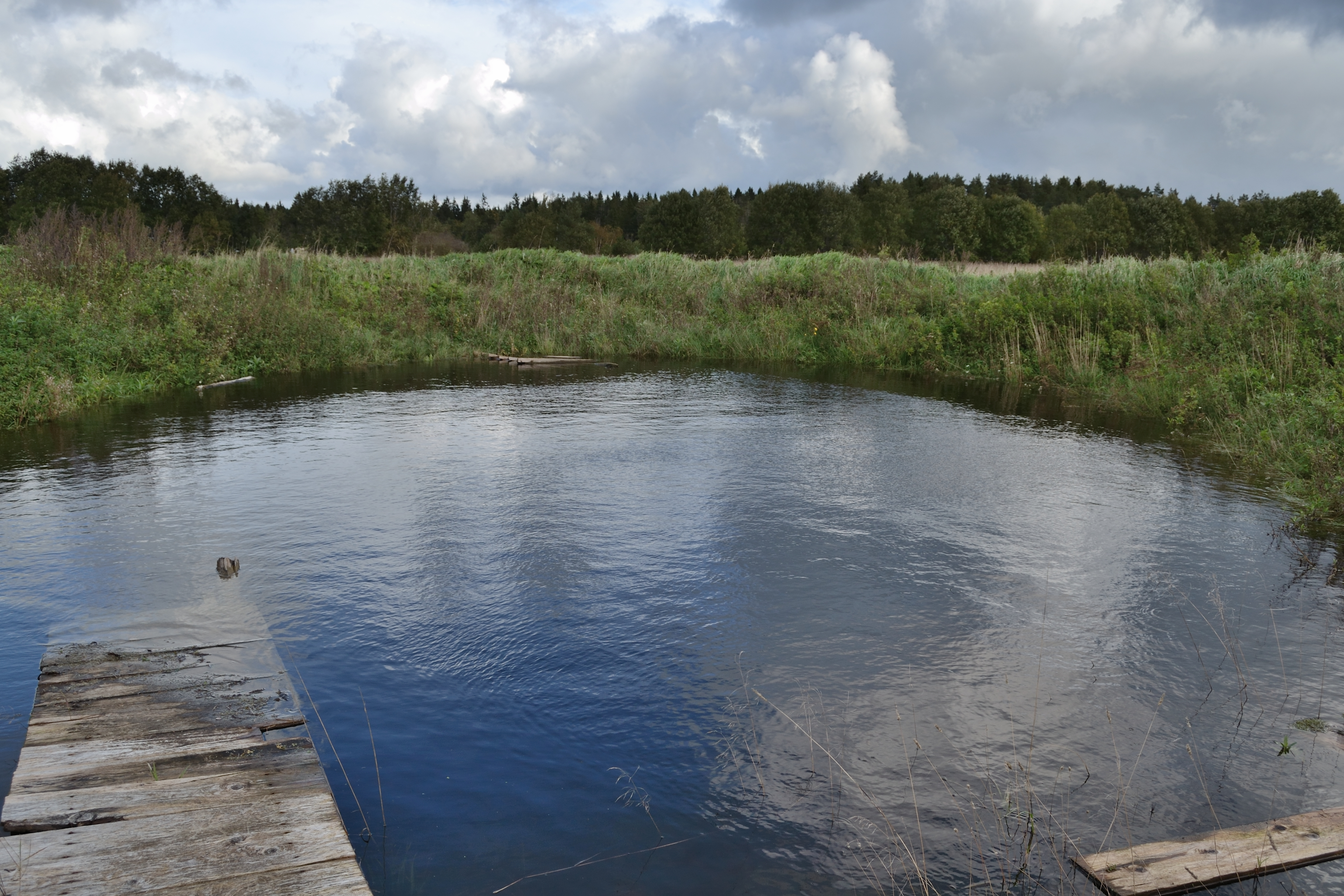 Ohvriallika "Püha allikas" arvatav asukoht, Keila vald, Ohtu küla